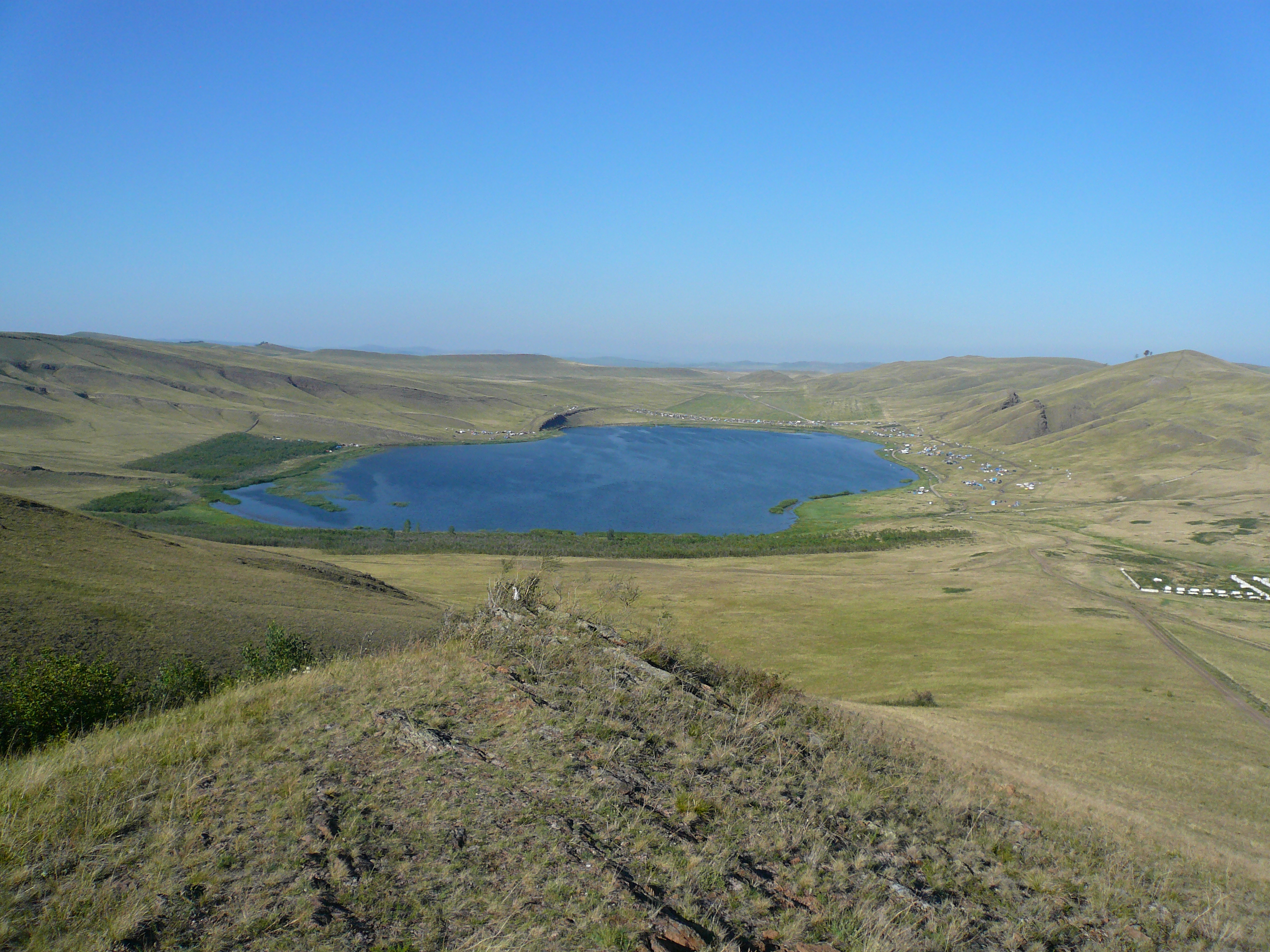 Озеро Шунет: Ширинский район, Хакасия This image is related to the protected area of Russia number 1910121